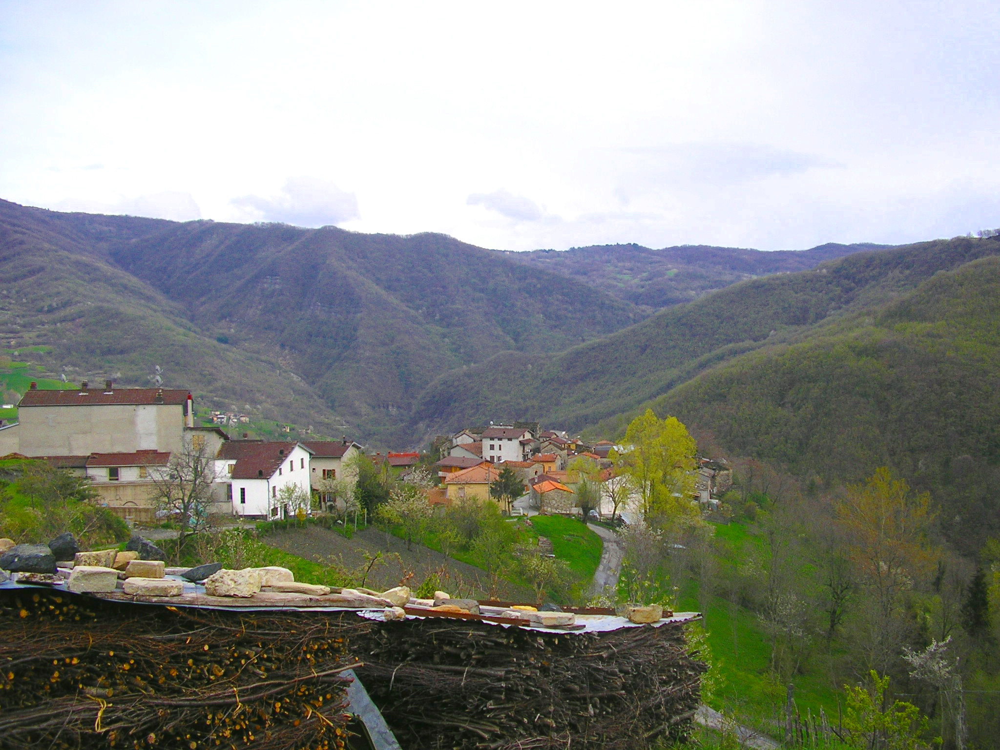 Aglio in Valperino